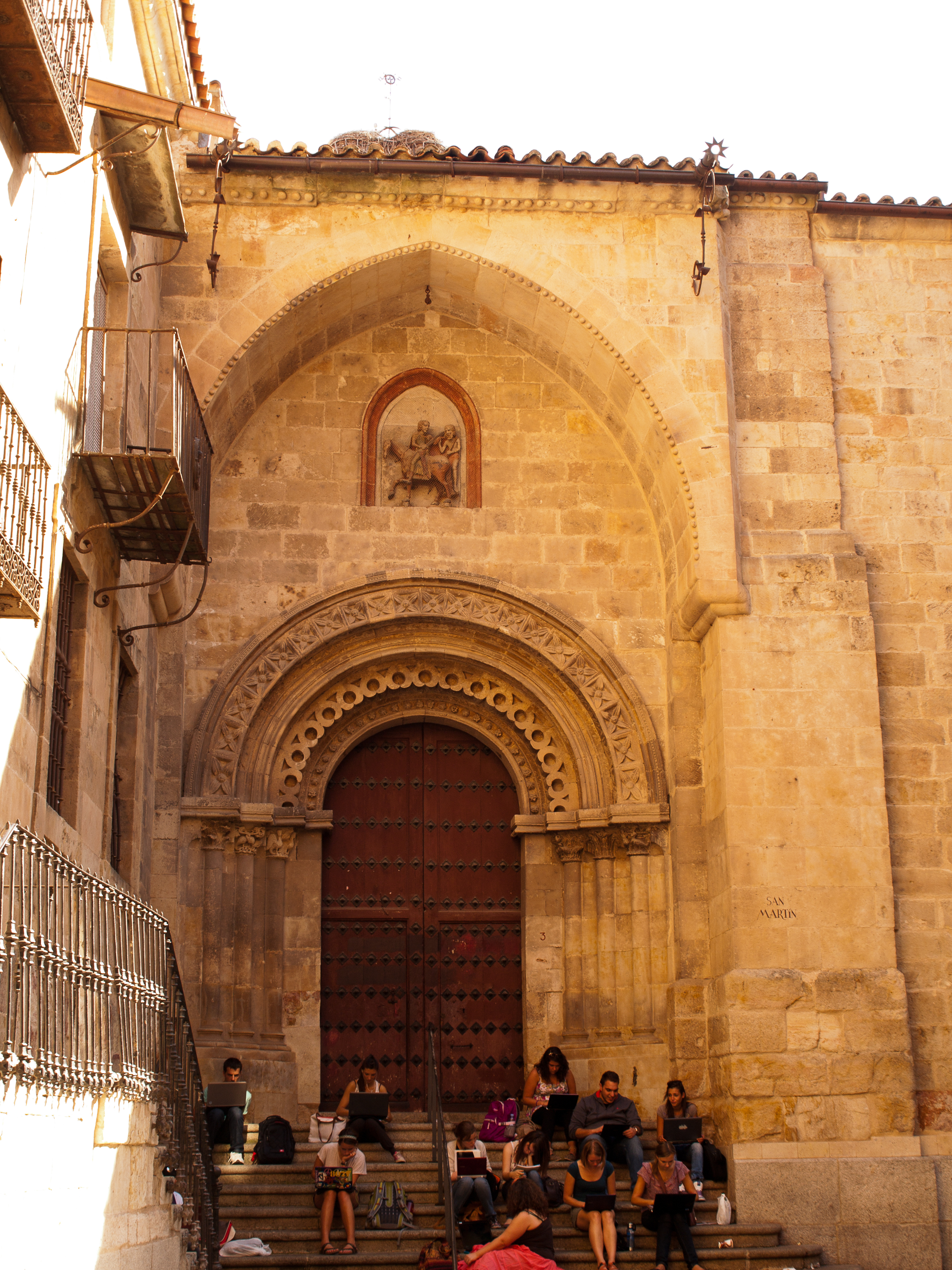 Fachada trasera de la parroquia de San Martín en Salamanca